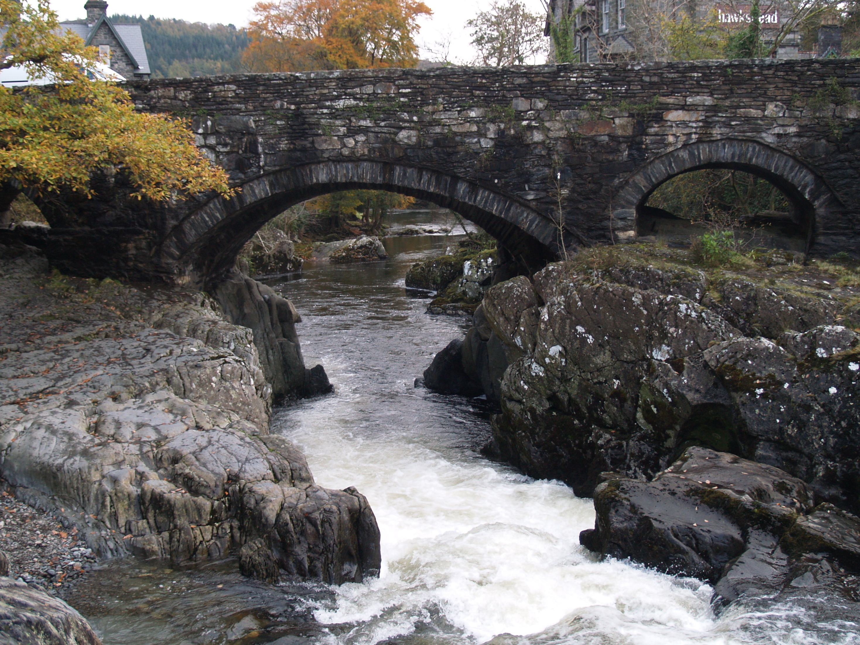 Pont-y-pair Bridge, Betws-y-Coed